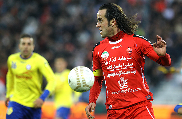 علی کریمی در بازی جام حذفی مقابل نفت تهران / پرسپولیس ۴ - نفت تهران ۱ / دی ۱۳۹۱